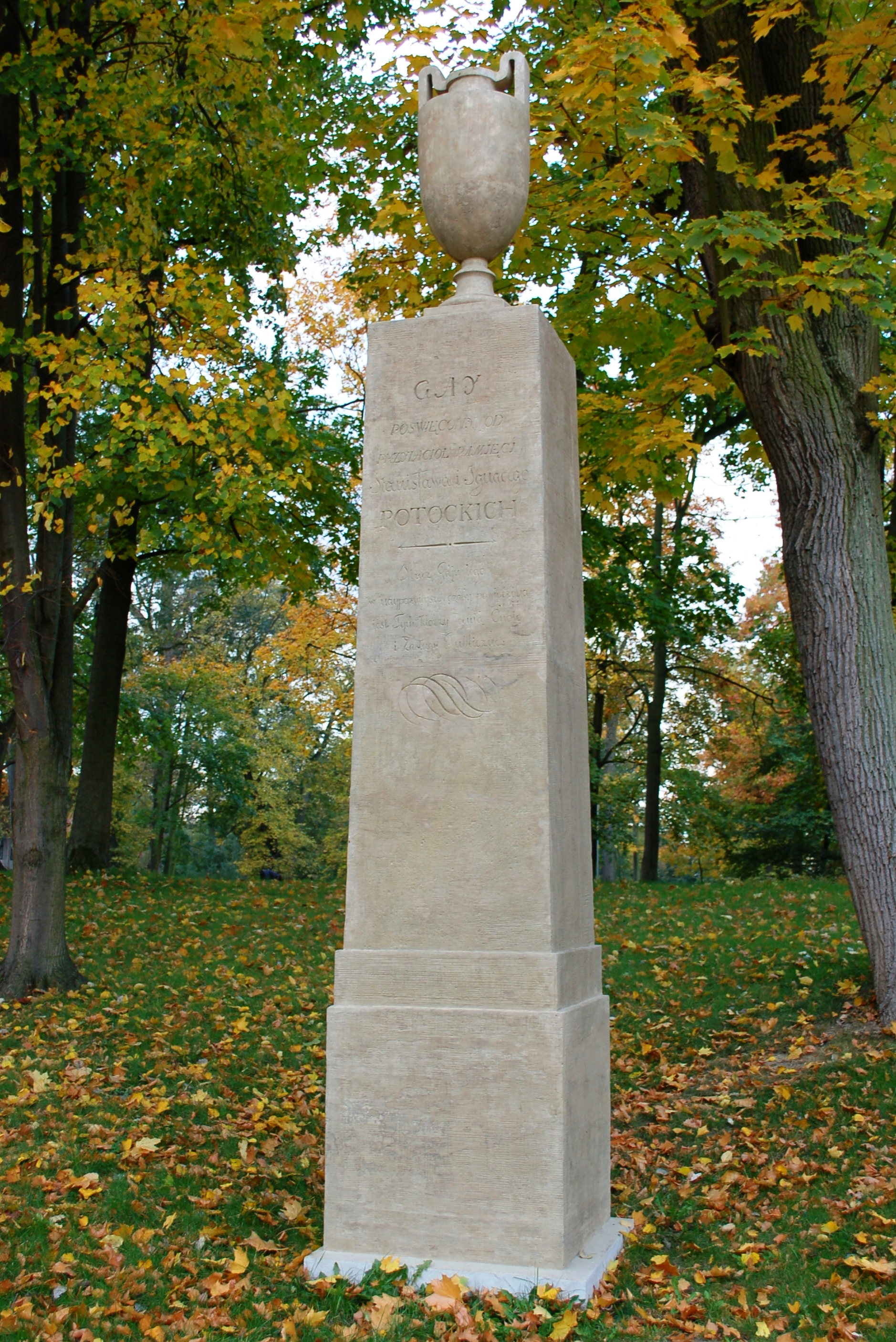 Wilanów